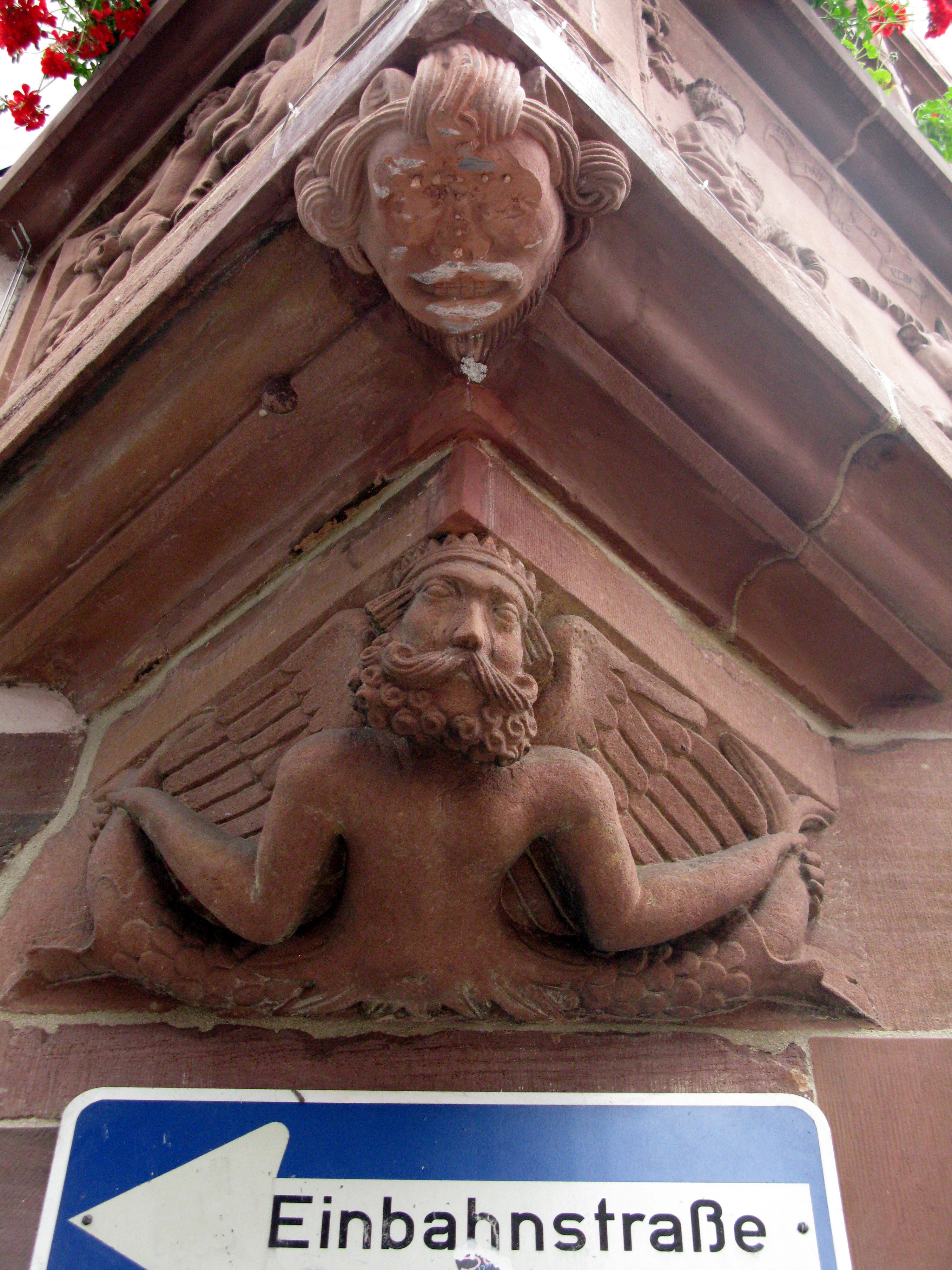 lädierte Figur am Einhornerker des Neuen Rathauses von Freiburg im Breisgau